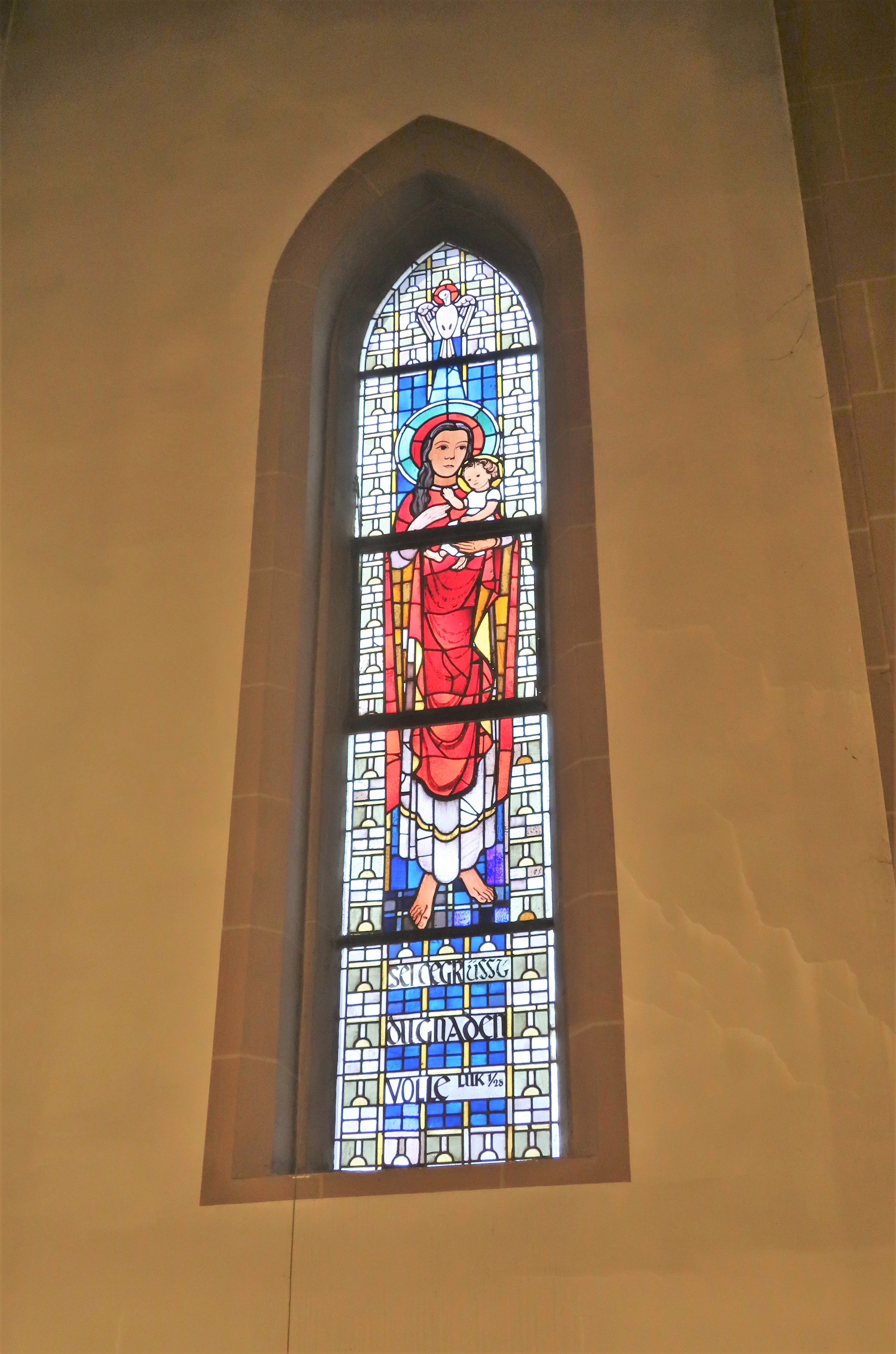 Katholische St. Bonifatius Kirche in Hagen-Hohenlimburg. Im alten Kirchenschiff das Fenster „Maria mit Kind – Sei gegrüsst du Gnadenvolle“ von Walter Klocke, ca. 1953.